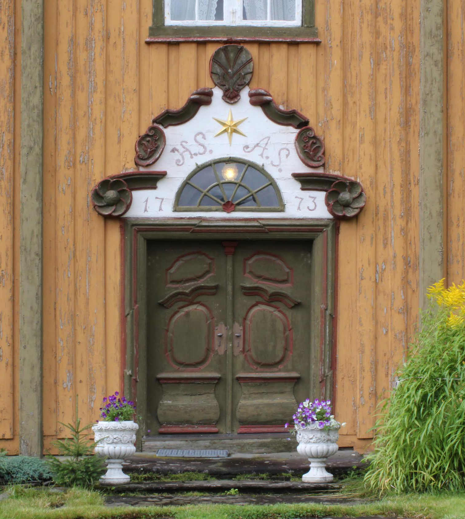 Main door, Gjesvål, Orkdal, Norway.